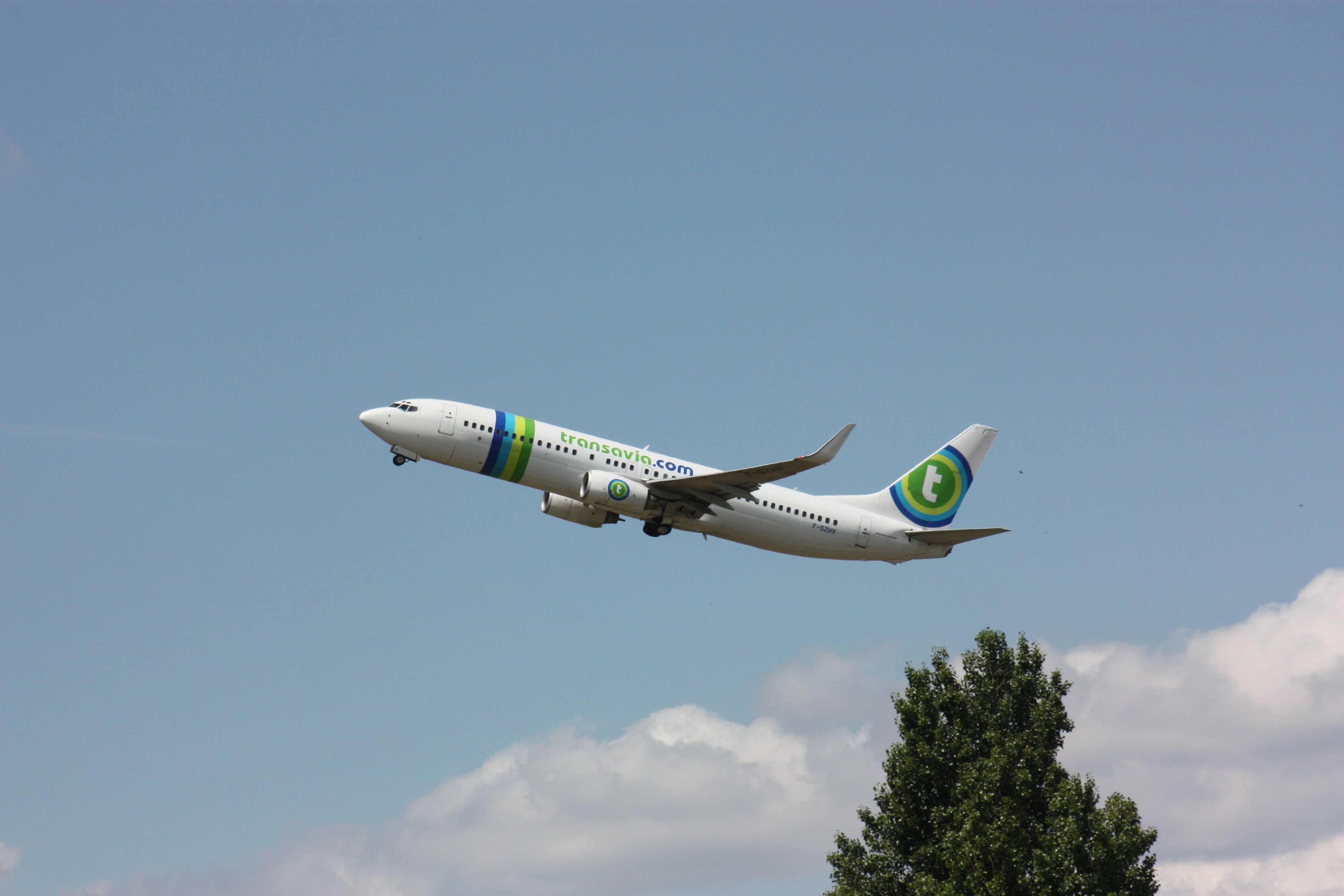 Boeing 737-800 F-GZHV de la compagnie aérienne française France au décollage à Orly piste 24 à 14h59 (piste n°4 d'Orly)